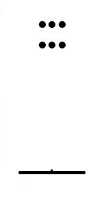 Errioxako jokoaren eskema sinplea